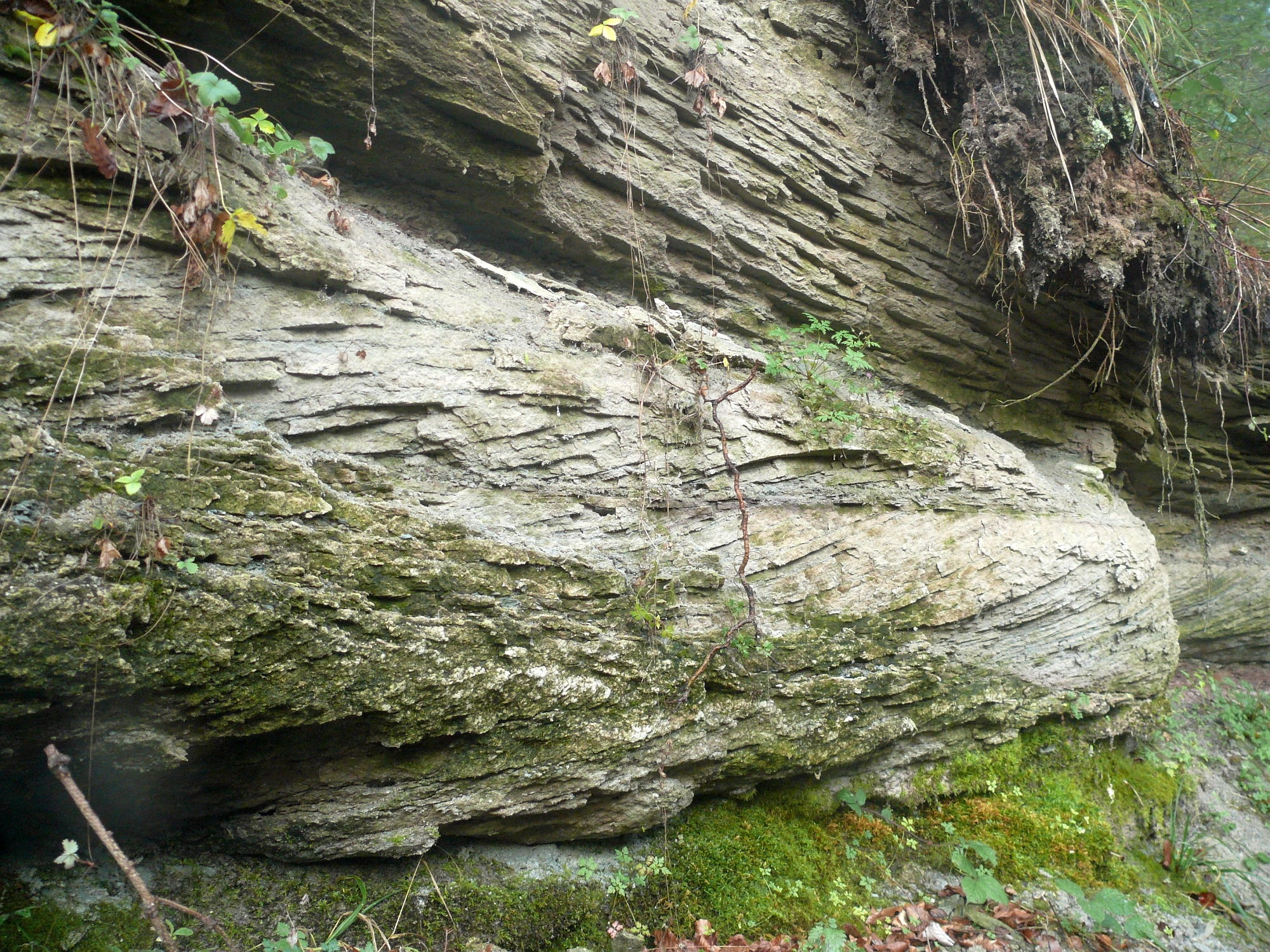 Hassberge-Formation (Unterer Kieselsandstein), Schrägschichtung, unmittelbar über den Mergeln der Lehrbergschichten, Bachklinge bei Bühlertann am obersten Avenbach (Bachname nach dem Geodatenviewer des Landesamtes für Geoinformation und Landentwicklung Baden-Württemberg).